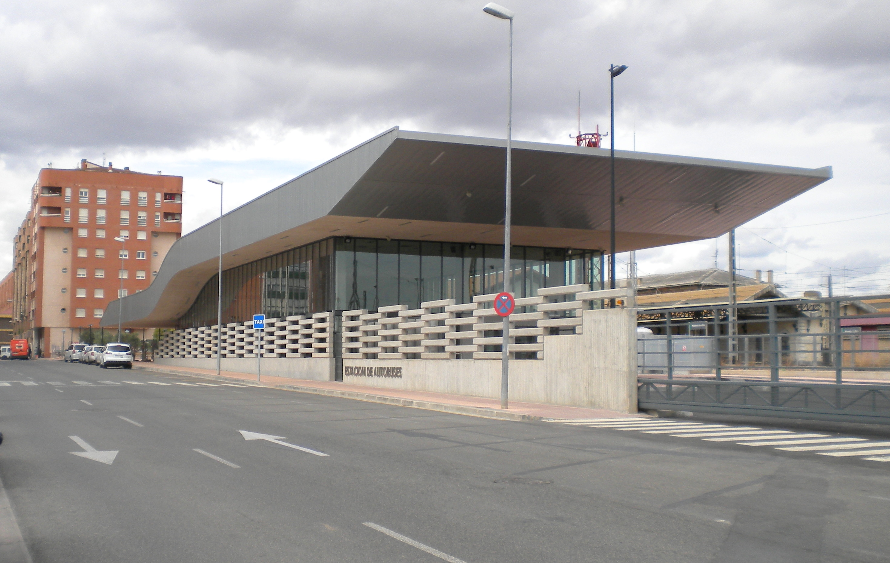 Estación de autobuses de Miranda de Ebro (Castilla y León, España) Bus station of Miranda de Ebro (Castilla y León, Spain)